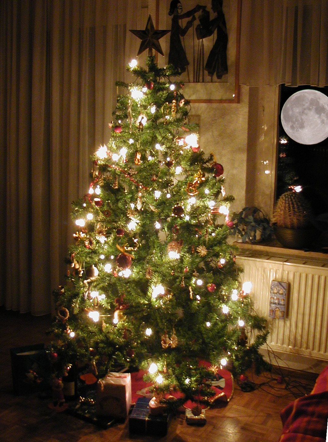 Ein Weihnachtsbaum mit Mond im Fenster (Erster Versuch mit GIMP 2.2)